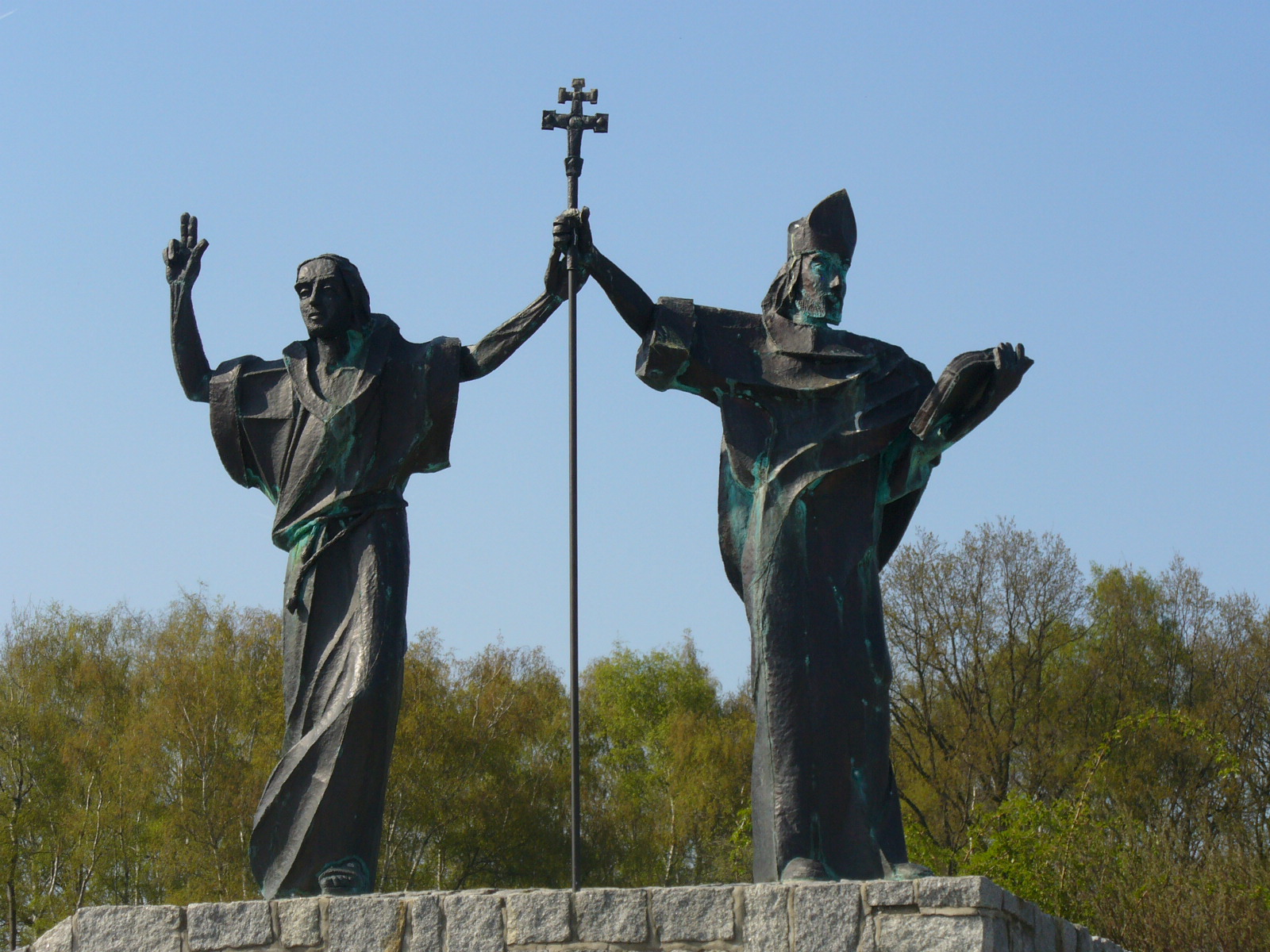 Millenniumsdenkmal mit dem hl. Cyrill und Methodius an der Kreuzung Dreikretscham-Loga-Strohschütz-Schmochtitz. Künstlerische Gestaltung: Dobroslaw Baginski, Lublin, 2000. Die aus Kupferblech getriebenen Figuren stellen die Slawenapostell Cyrill und Methodius (9. Jh.) dar.